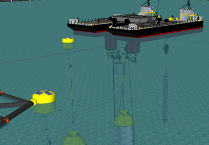 barge de stockage d'énergie vue d'artiste